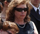 Lucía Pinochet en el funeral de su padre (2006).